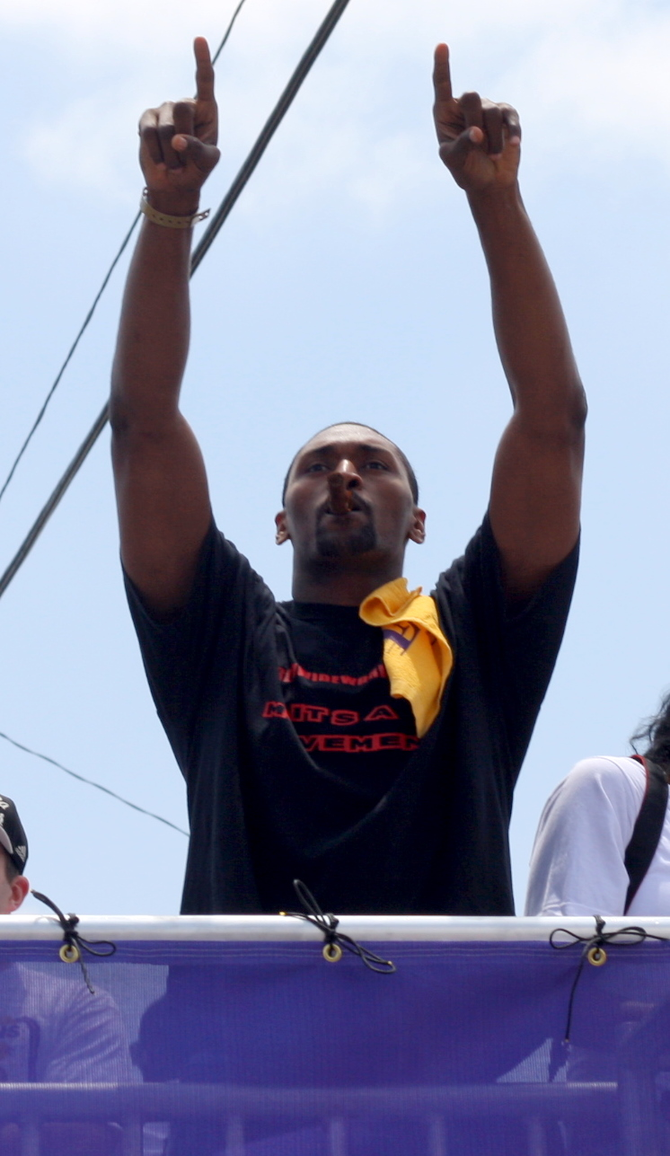 Lakers parade (74)